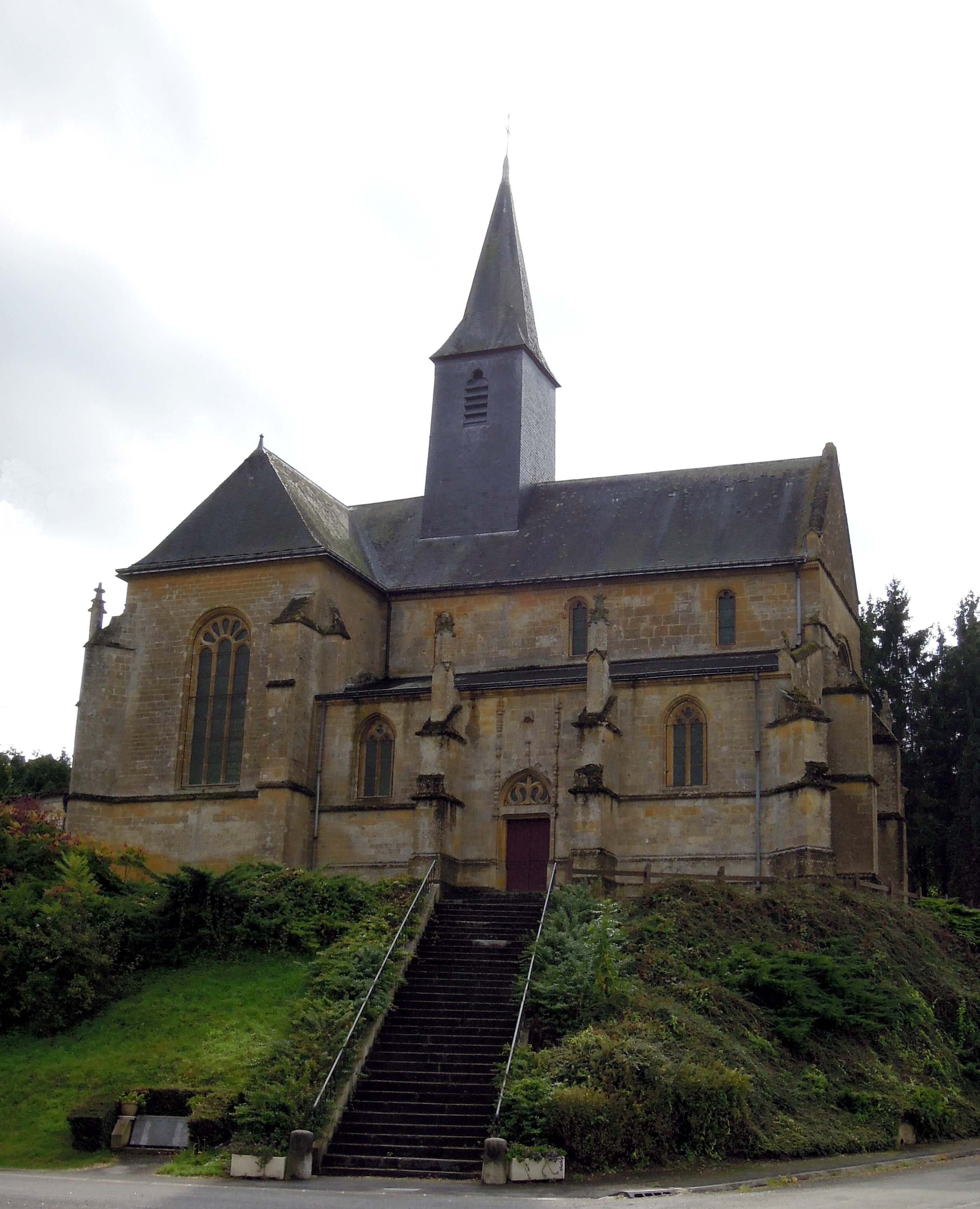 Église Saint-Pierre-aux-Liens, (Classé, 1913) .